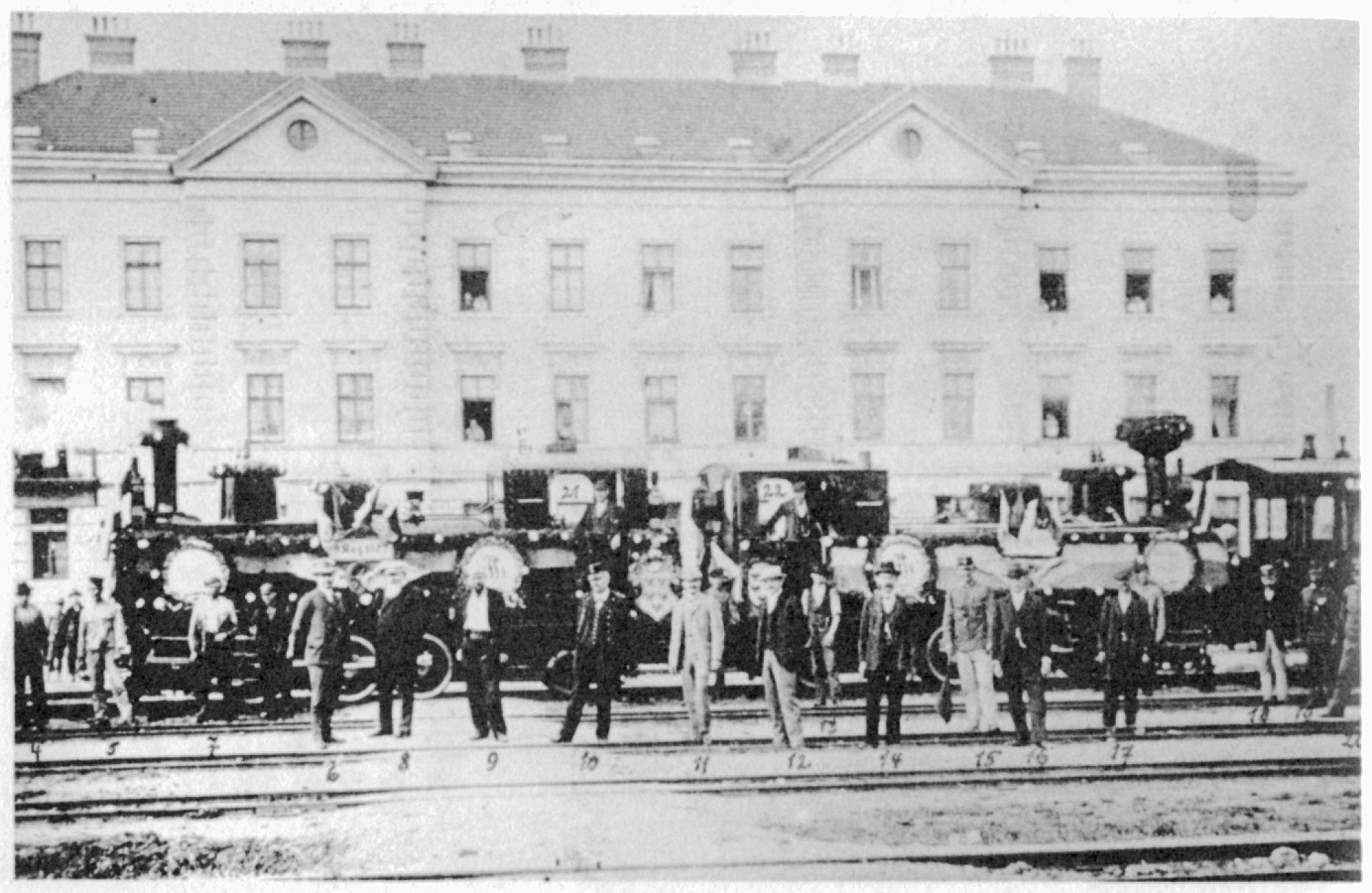 Opening train of the southern line of the Waldviertler Schmalspurbahnen, Lower Austria - Eröffnungszug der Südstrecke der Waldviertler Schmalspurbahnen, Niederösterreich